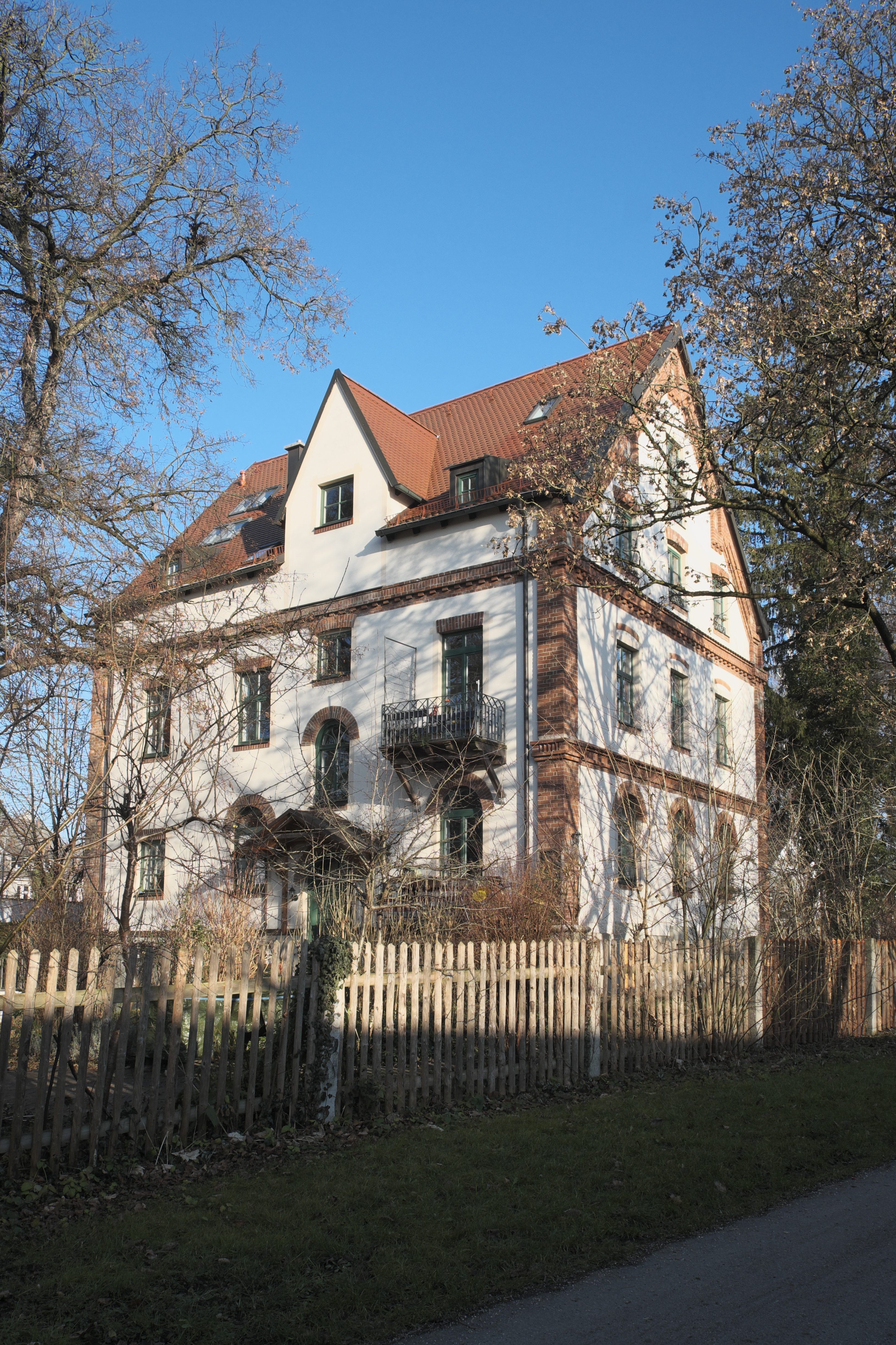 Vorstadtvilla, Theodor-Storm-Straße 7, in Pasing im Stadtbezirk Pasing-Obermenzing in München (Bayern/Deutschland), 1892 von Ludwig Lang erbaut